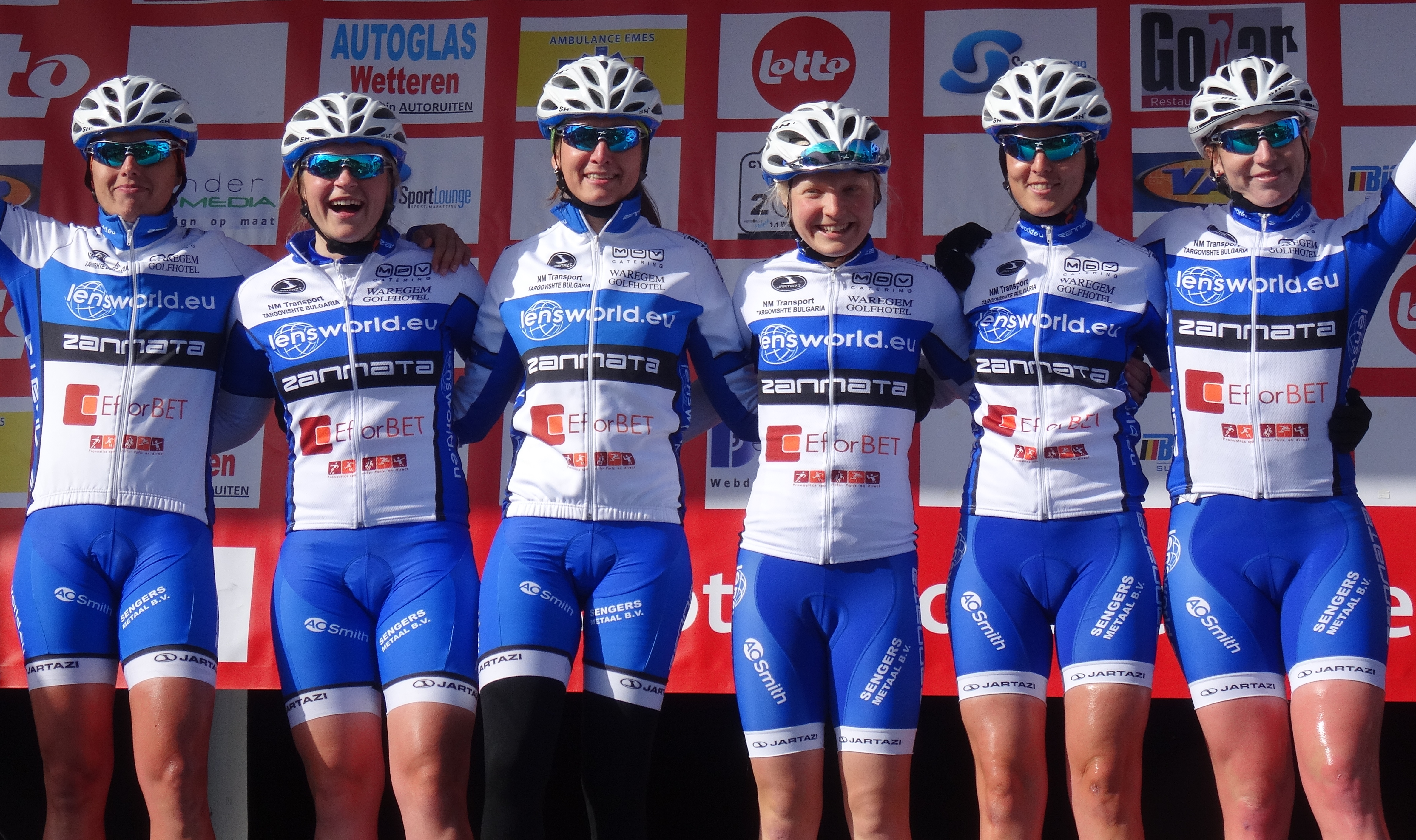 Reportage réalisé le mercredi 4 mars à l'occasion du départ du Samyn des Dames 2015 et du Samyn 2015 à Quaregnon, Belgique.